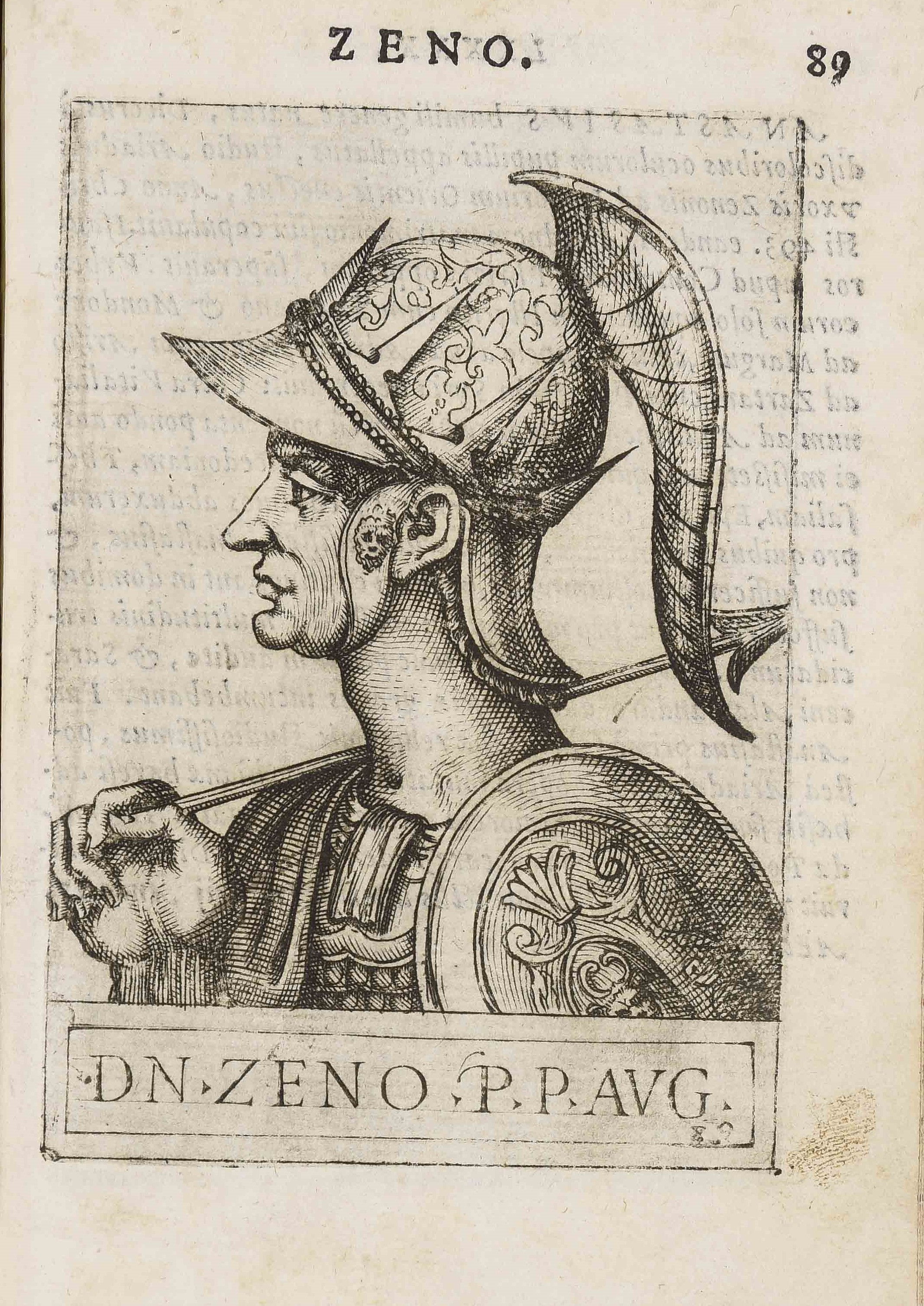 Calcografia in Giovanni Battista Cavalieri & Thomas Treterus, Romanorum imperatorum effigies, Roma, Vincenzo Accolti, 1583.